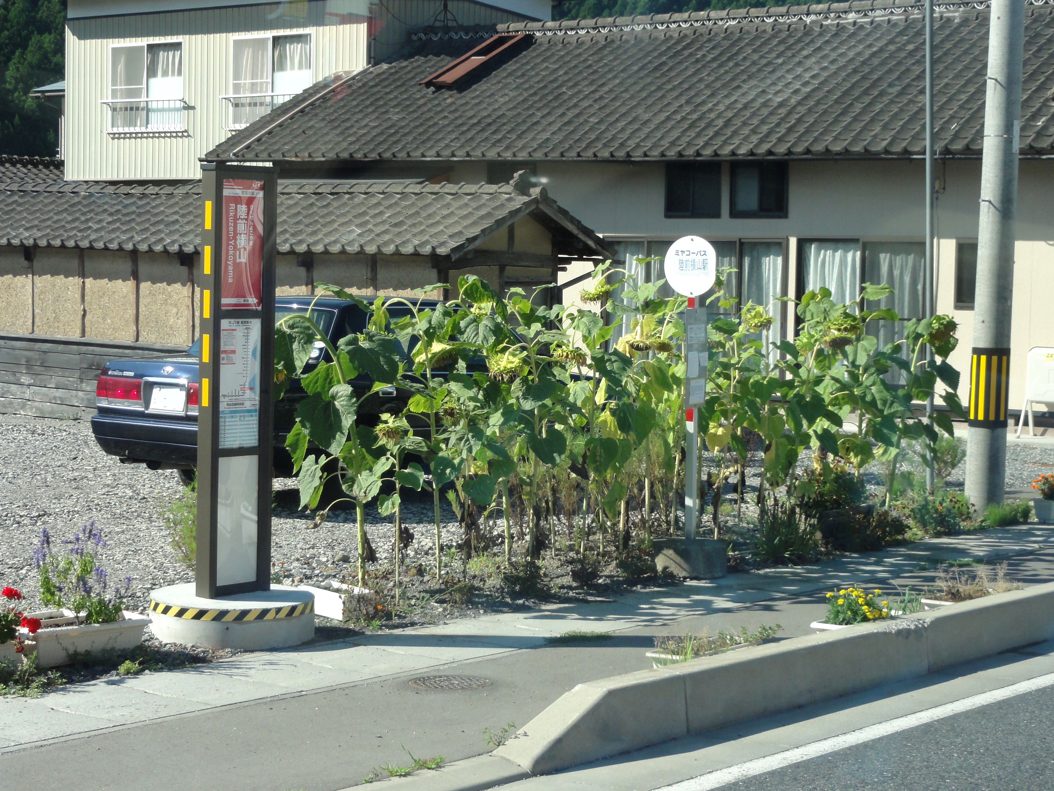 陸前横山駅 代行バス・バス停